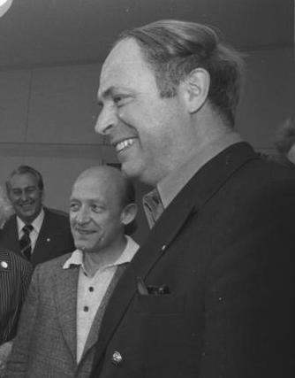 Berlin, Erich Honecker, Lars Werner ADN-ZB/Koard/1.7.74/Berlin: Der Erste Sekretär des ZK der SED, Erich Honecker (links) empfing am 1.7.74 die in der DDR weilende Delegation der Linkspartei-Kommunisten Schwedens (VPK) unter der Leitung des stellvertretenden Parteivorsitzenden Lars Werner (r.) zu einem Gespräch. Dabei waren das Mitglied des Politbüros und Sekretär des ZK der SED Paul Verner (2.v.l.), der Kandidat des Politbüros der ZK der SED Konrad Naumann (3.v.r.) sowie weitere Persönlichkeiten zugegen. Abgebildete Personen: Honecker, Erich: Staatsratsvorsitzender, Generalsekretär des ZK der SED, DDR (GND 118553399) Naumann, Konrad: 1. Sekretär Bezirksleitung Berlin der SED, Staatsratsmitglied, DDR (GND 121094510) Verner, Paul: Mitglied des Staatsrates, Sekretär des Zentralkomitees der SED, DDR (GND 118626639) Werner, Lars: Vorsitzender der KP, Schweden